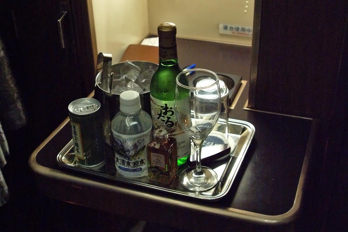 撮影日：2004年7月18日 撮影場所：北斗星3号A寝台ロイヤル室内 備考：ウェルカムドリンクのミニバーセット